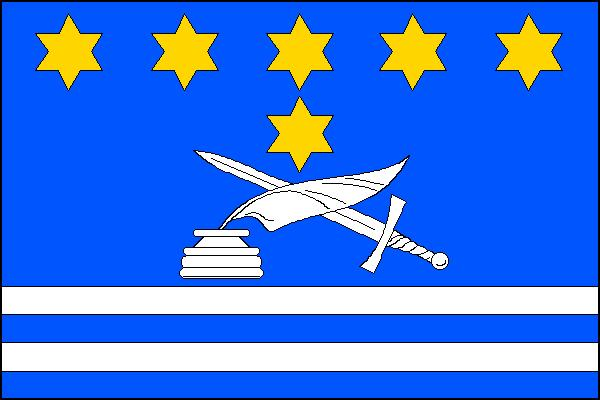 Vlajka obce Libuň